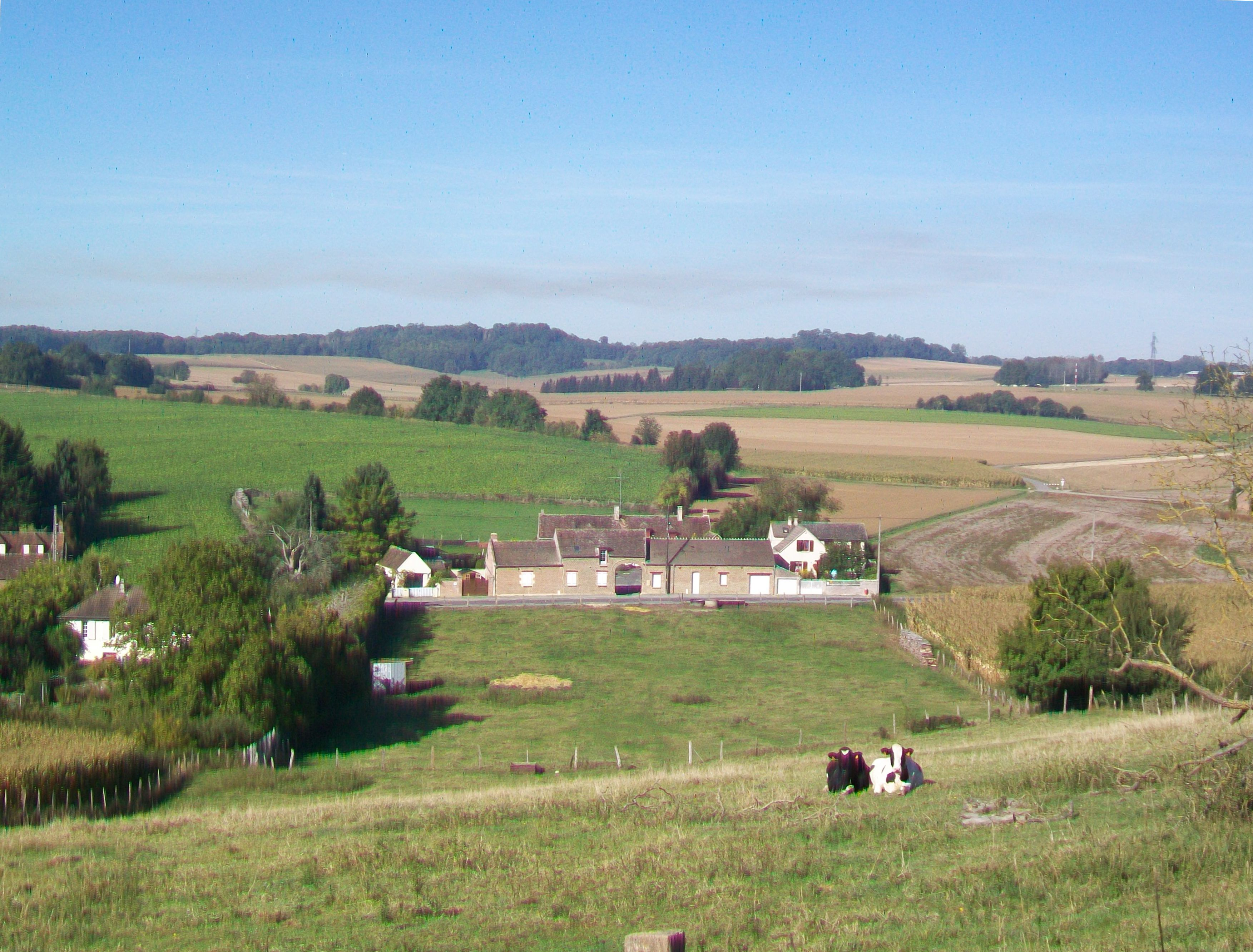 Ancienne ferme près du hameau de Caumont.